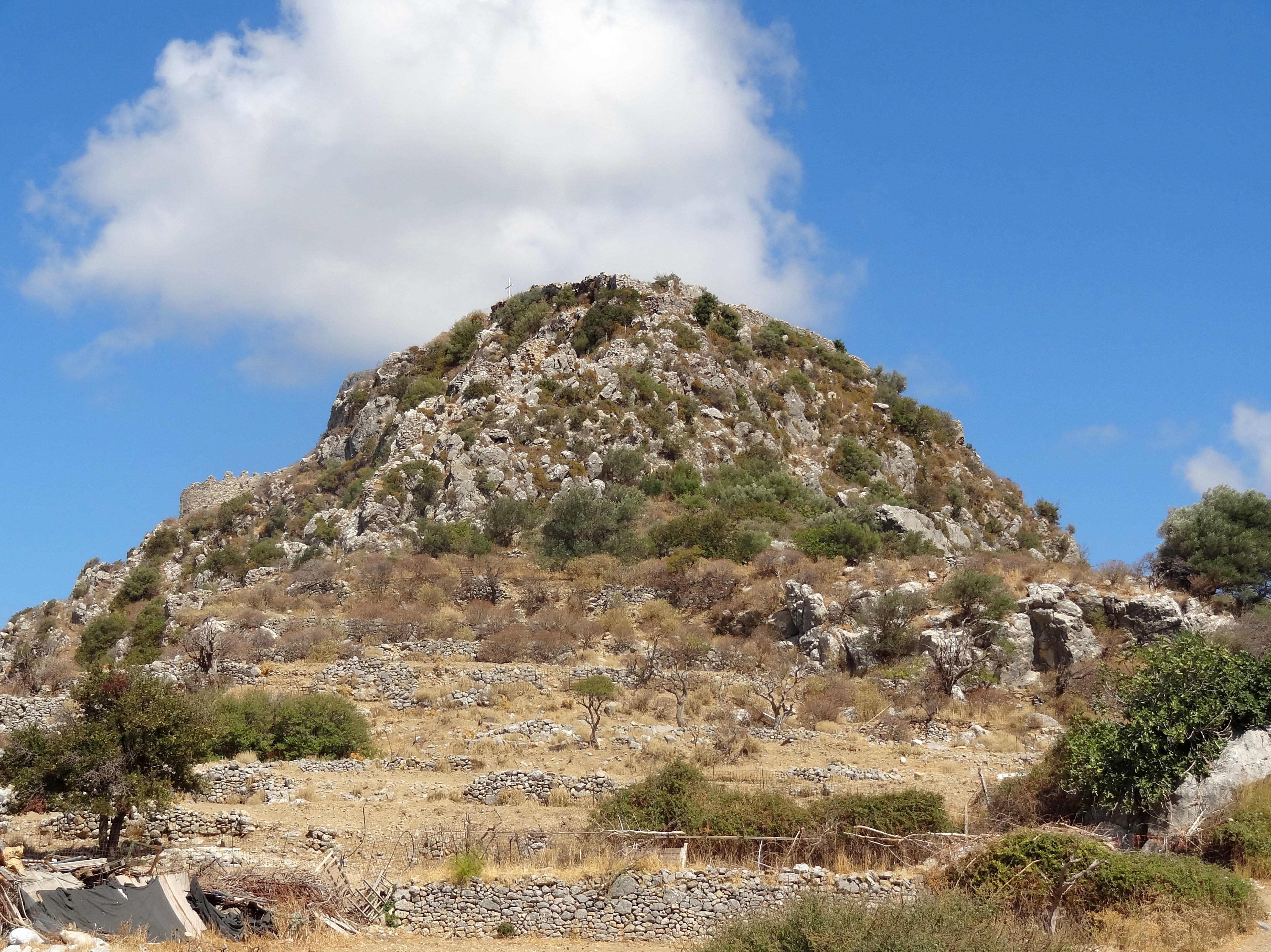 Blick zur Akropolis des antiken Polyrrhenia (Πολυρρηνία), Gemeinde Kissamos, Regionalbezirk Chania, Kreta, Griechenland